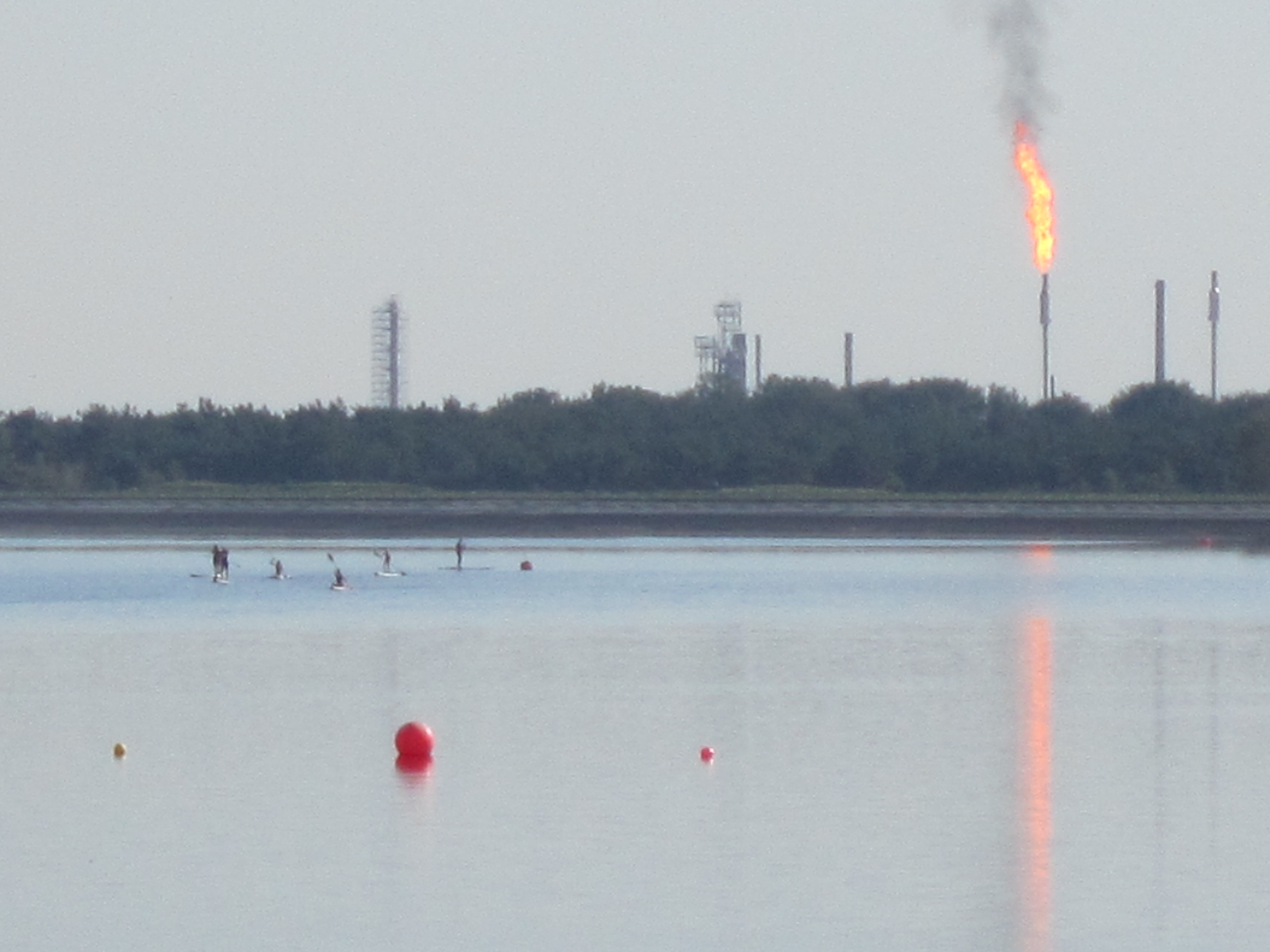 Geester Speichersee - Blick vom Restaurant zur Erdölraffinerie Lingen